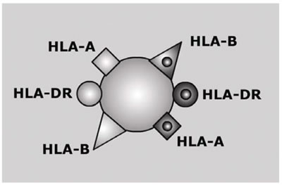 Infografía donde se ilustra la convención utilizada en los dibujos para representar los haplotipos del sistema HLA. Author: Fernando da Rosa